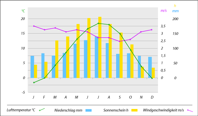 klima karte sb